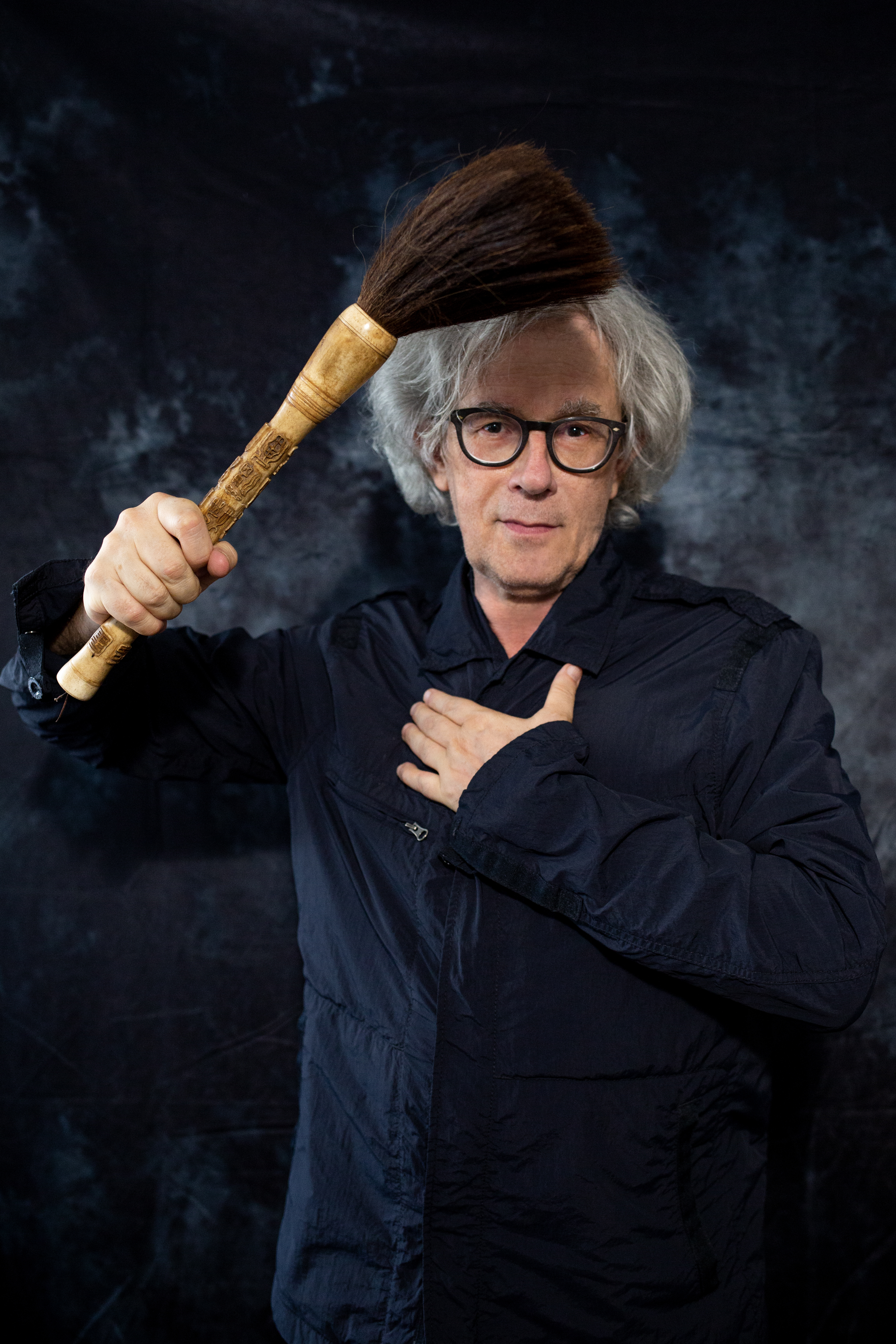 Marco Pesatori